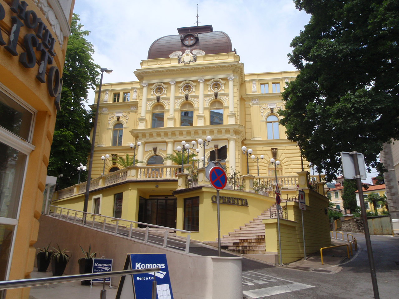 Opernhaus Opatija, war Shopping Center, ehemals Leseverein - Casino di Lettura von Abbazia